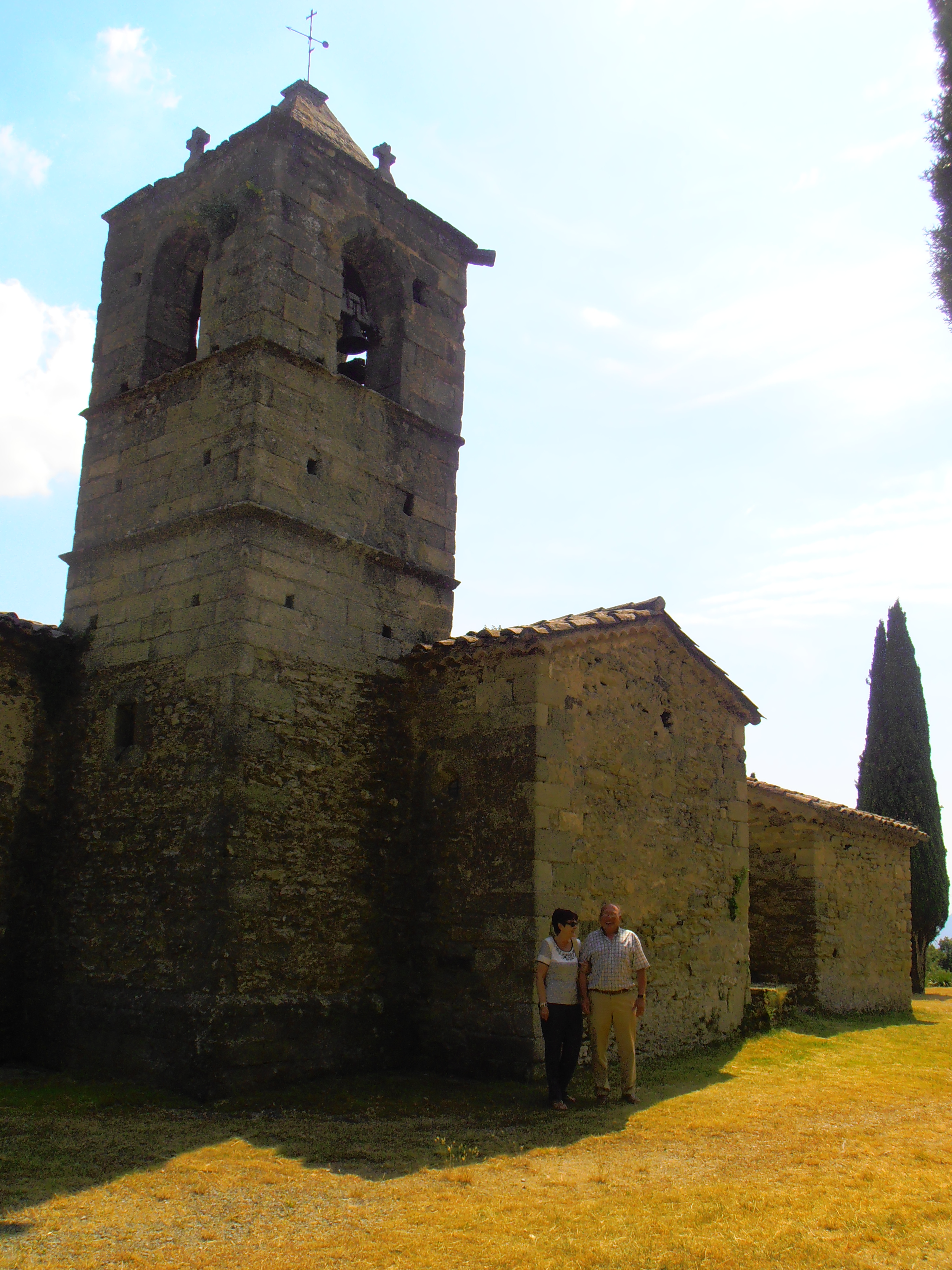 Vista de l'ermita des de Ponent